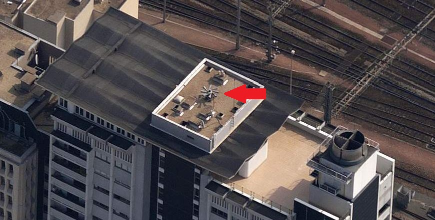 Sirène de la résidence Super Montparnasse à Paris XVème arrondissement.